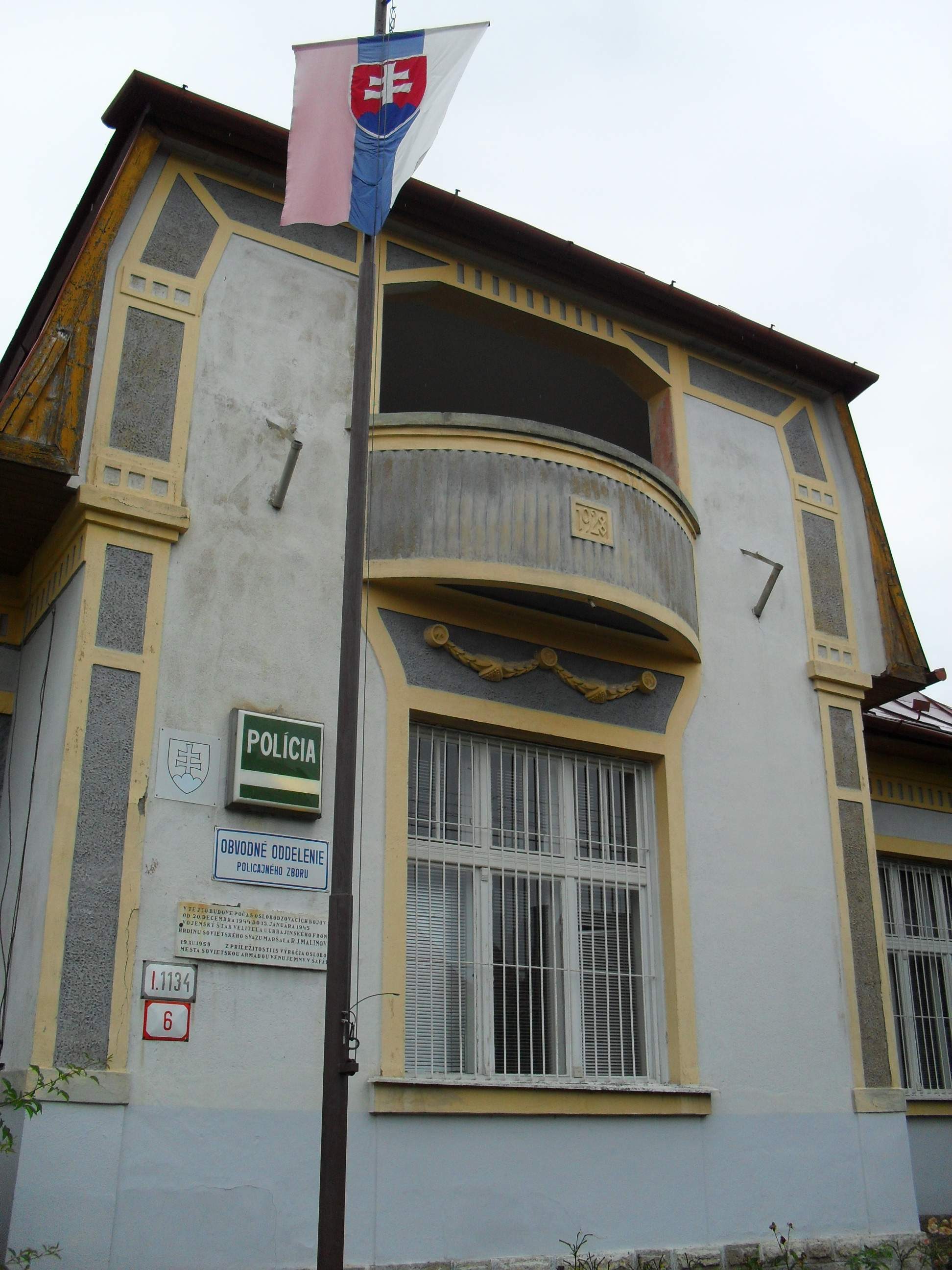 Tornalja - rendőrség